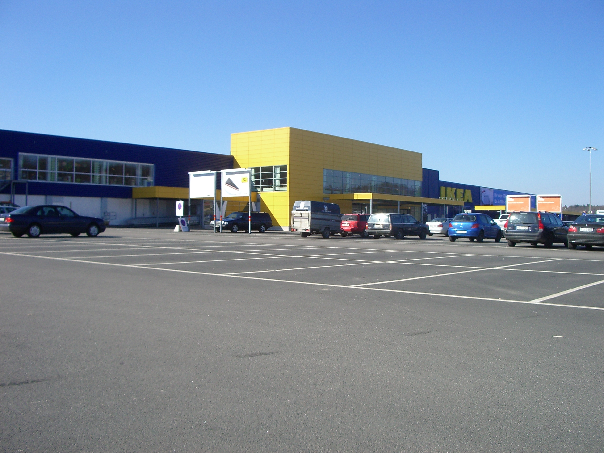 Bild på IKEA i Kållered, Sverige